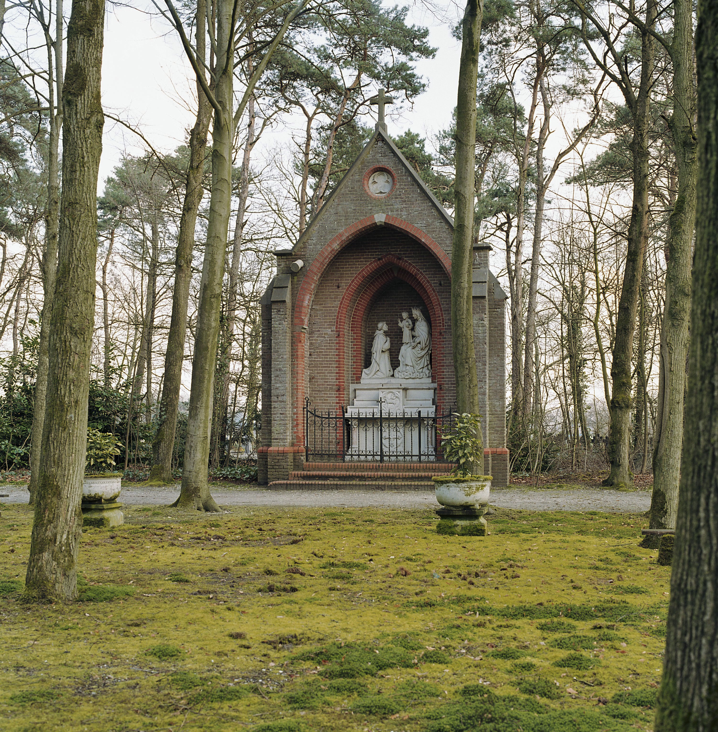 Rooms-Katholieke Kerk Van Maria Hemelvaart: Antonius kapelletje